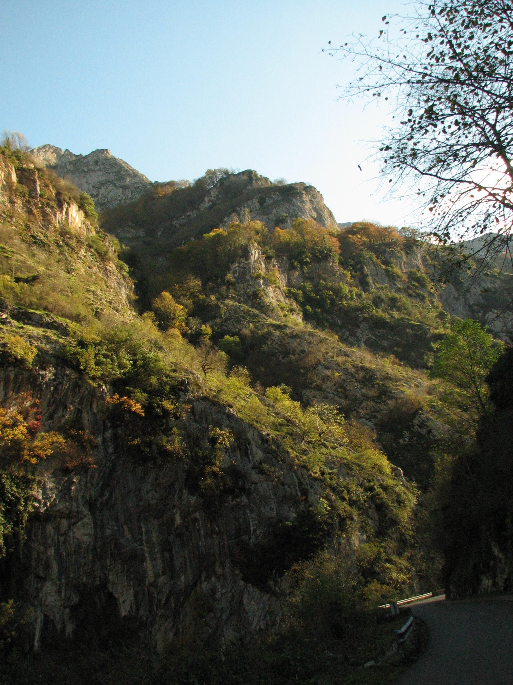 Desfiladero de los Beyos